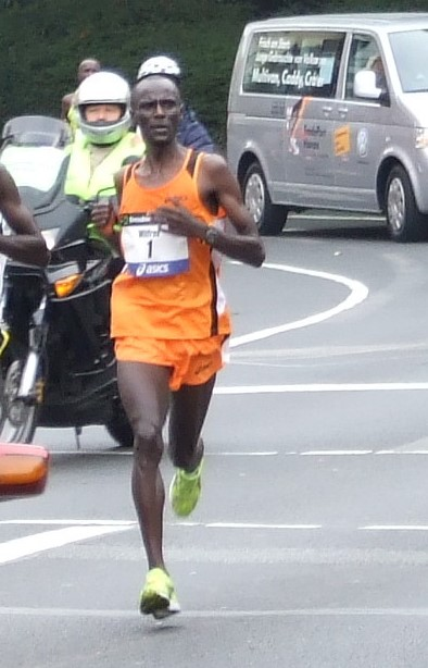 Wilfred Kigen, ca. 3 km vor dem Ziel beim Frankfurt-Marathon, 2007 in Ffm